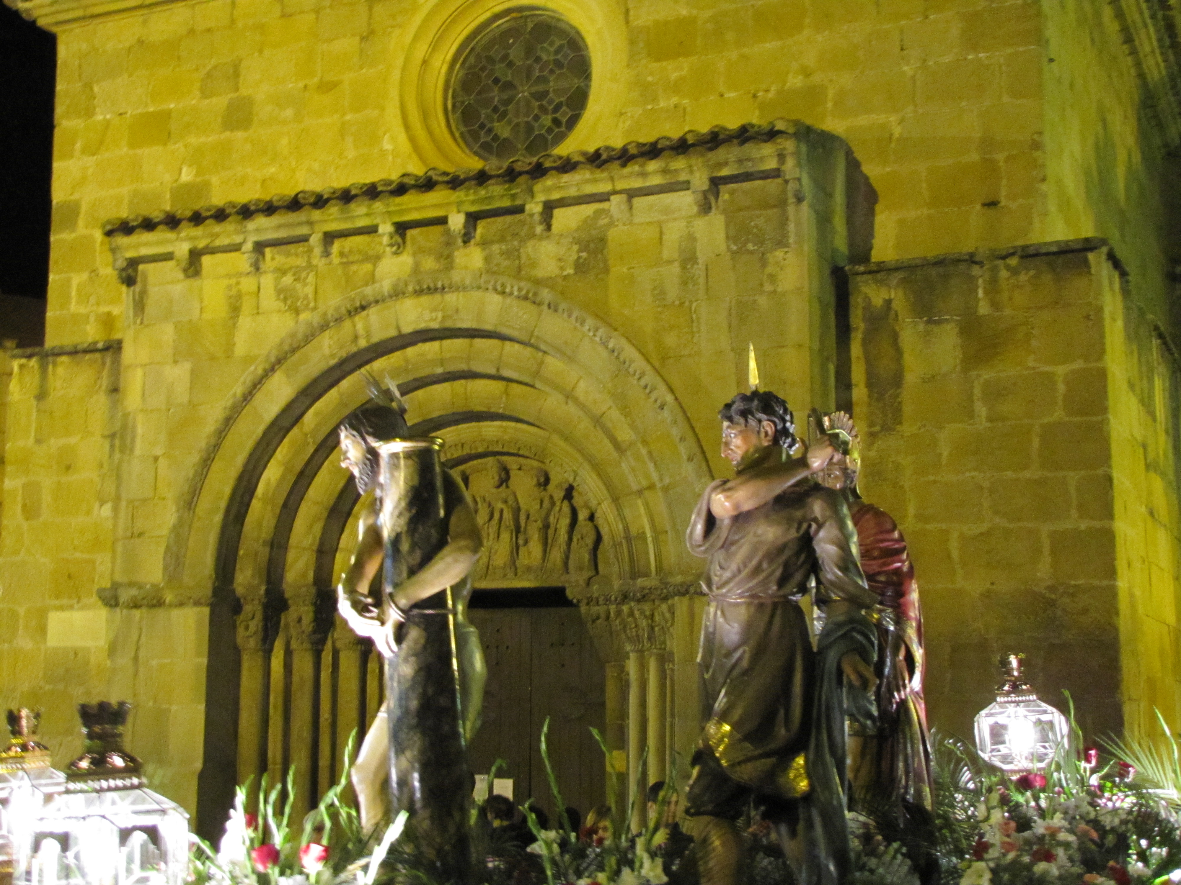 Paso de La Flagelación (Escuela de Olot, 1951). Semana Santa de Soria.